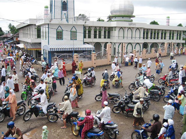 Majelis Taklim Guru Kapuh di Masjid Baiturrahmah Rantau